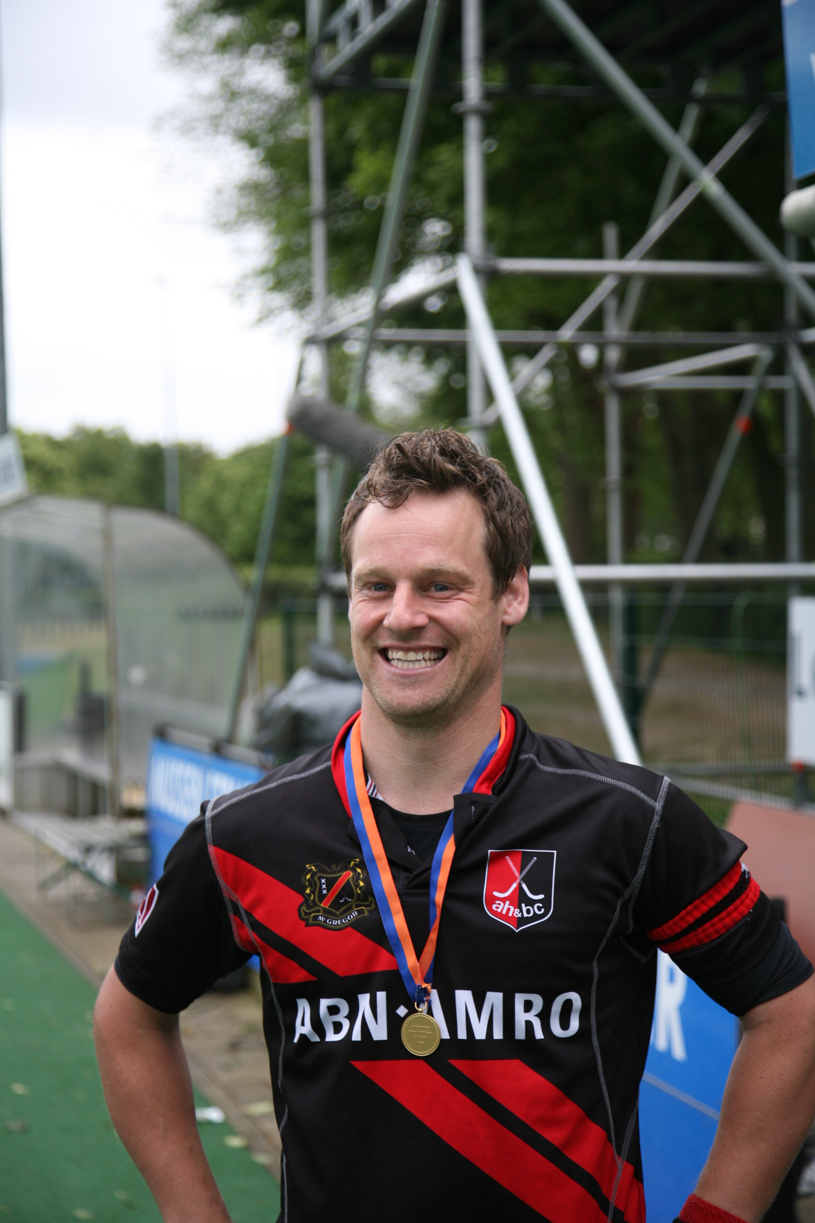 Finale landskampioenschap 2010-2011 Amsterdam winnaar met als aanvoerder Taeke Taekema.